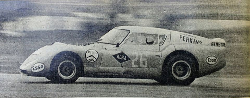 Baufer-Ford de Carmelo Galbato en la primera carrera de Sport Prototipo Argentino, Buenos Aires 1969